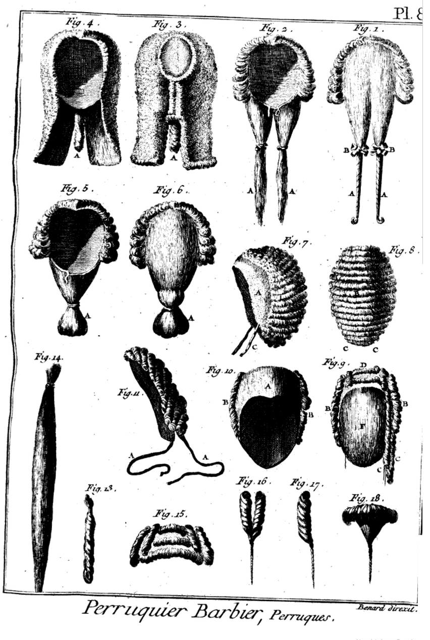 Figure 1 : extérieur et intérieur de la perruque à deux queues ; fig. 3 et 4 : intérieur et extérieur de la perruque carrée ; fig. 5 et 6 : extérieur et intérieur de la perruque à cadogan ; fig. 7 et 8 : perruque de femme ; fig. 9 et 10 : intérieur et extérieur de la perruque de femme à chignon relevé ; fig 11 : les cordons ; fig. 12 : boudin ; fig. 13 : cheveux servant de fausse queue ; fig. 14 : bonnet de cheveux ; fig. 15, 16 et 17 : boucles de différentes formes.